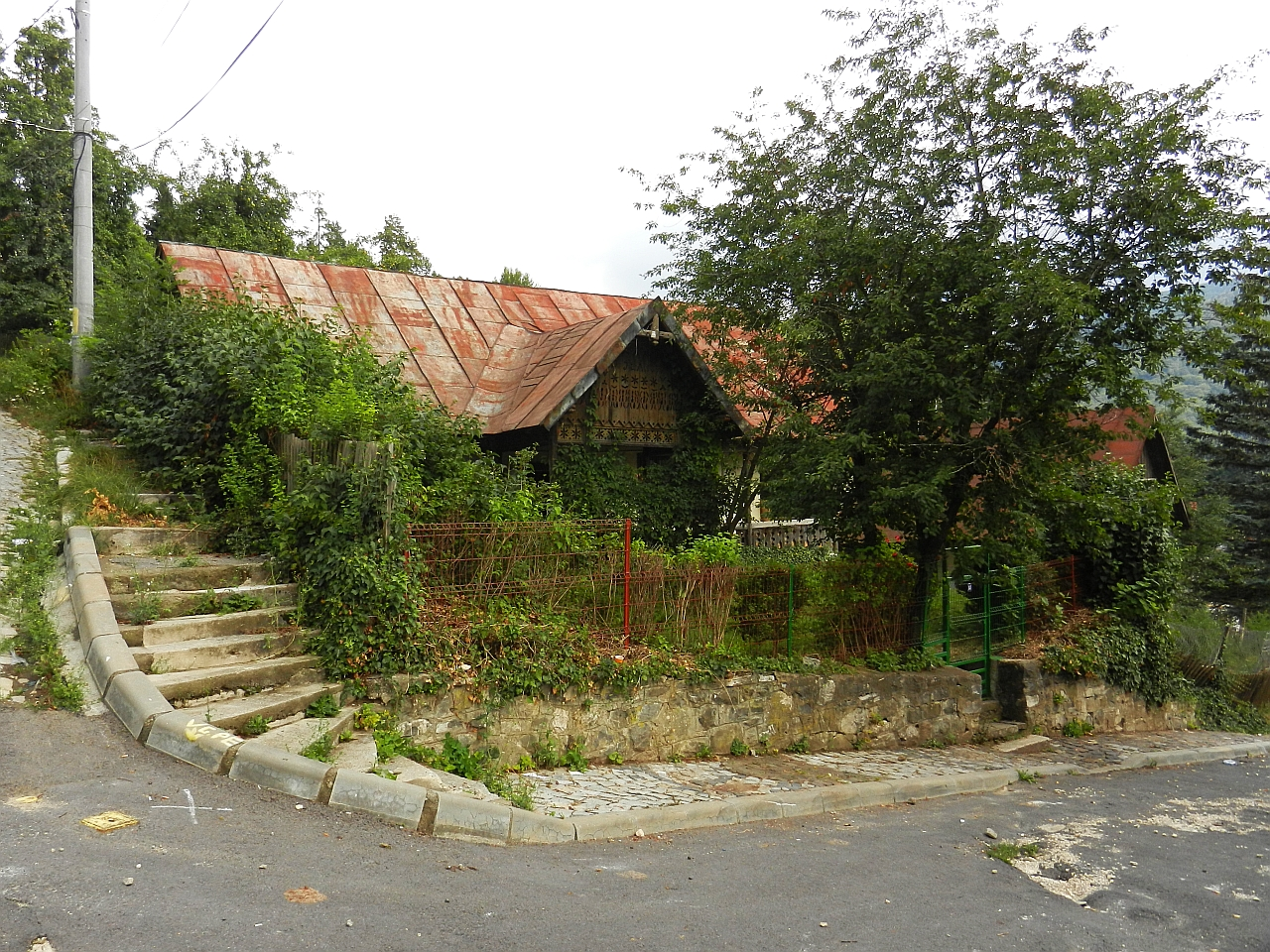 Casa Dan Trif